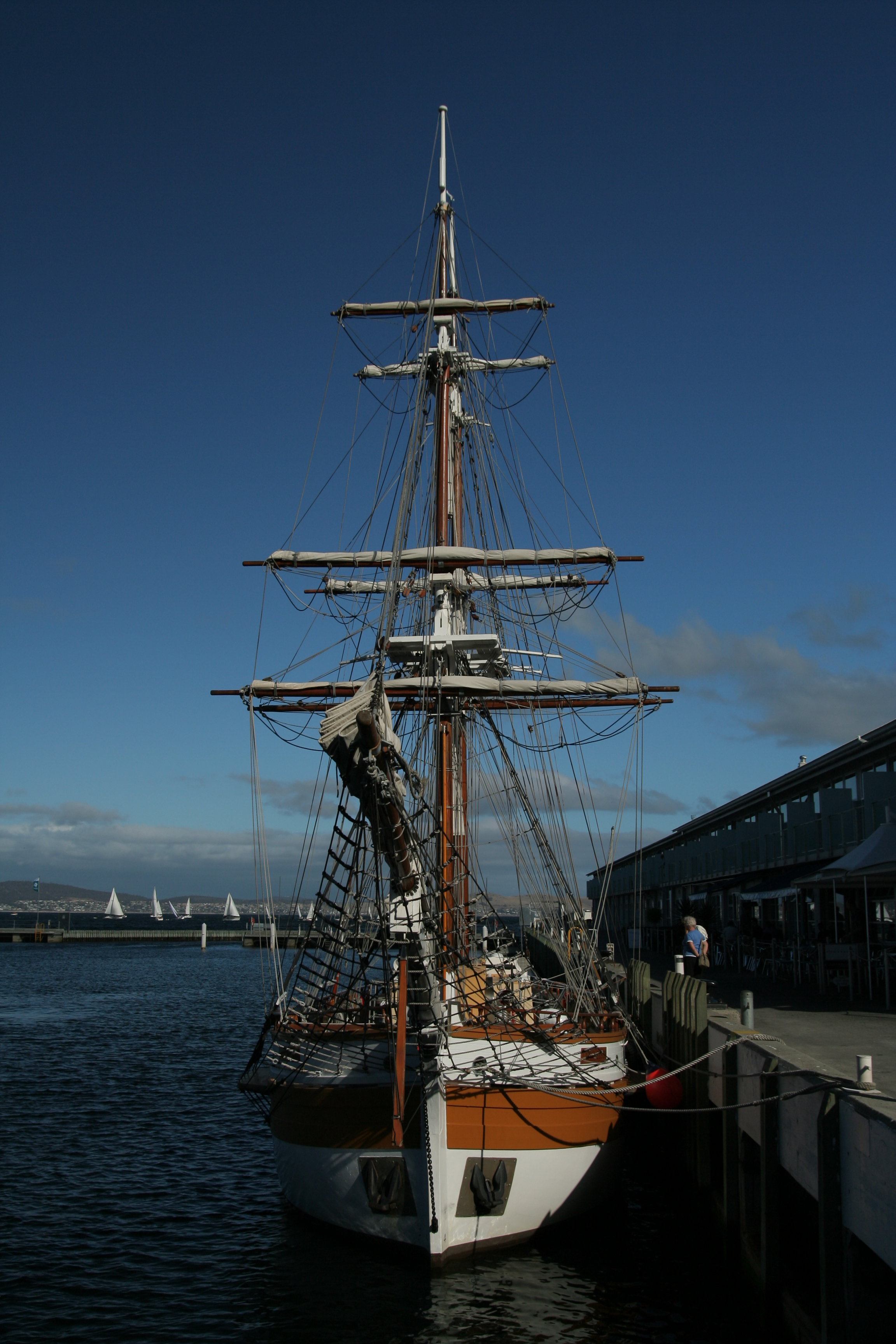 Le brick Lady Nelson